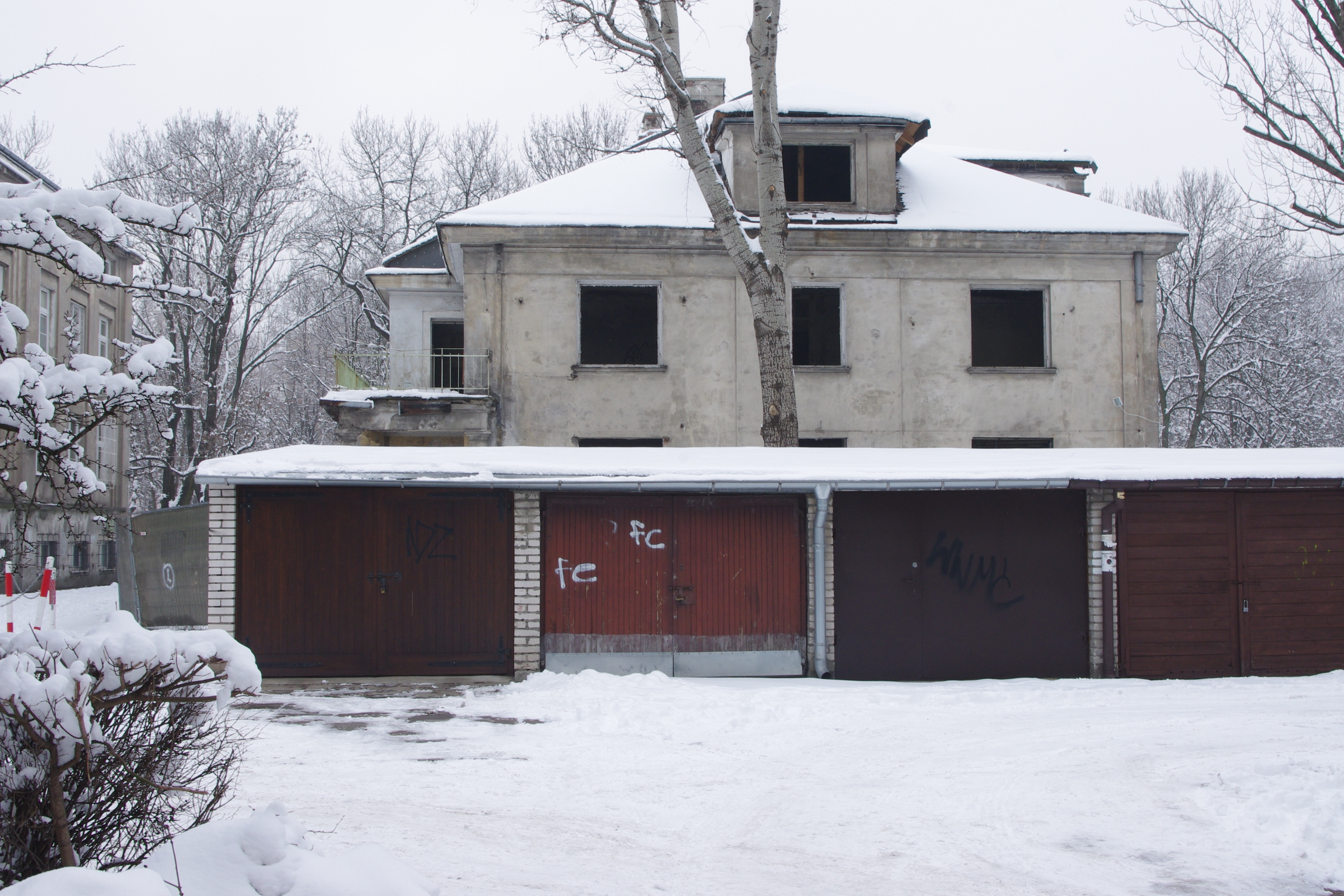 Willa przemysłowca kuśnierskiego Arpada Chowańczaka (Arpad Chowańczak) przy ul. Morskie Oko 5 w Warszawie – powstała w 1928 r., położona na warszawskim Starym Mokotowie. Od 2010 r., w rejestrze zabytków.